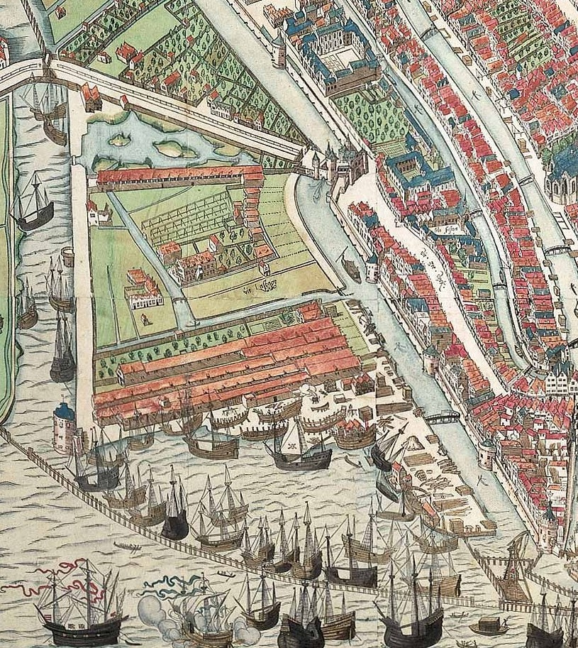 De Lastage, een deel van de Vogelvluchtkaart van Amsterdam door Cornelis Anthonisz., schilder, graveur en cartograaf.